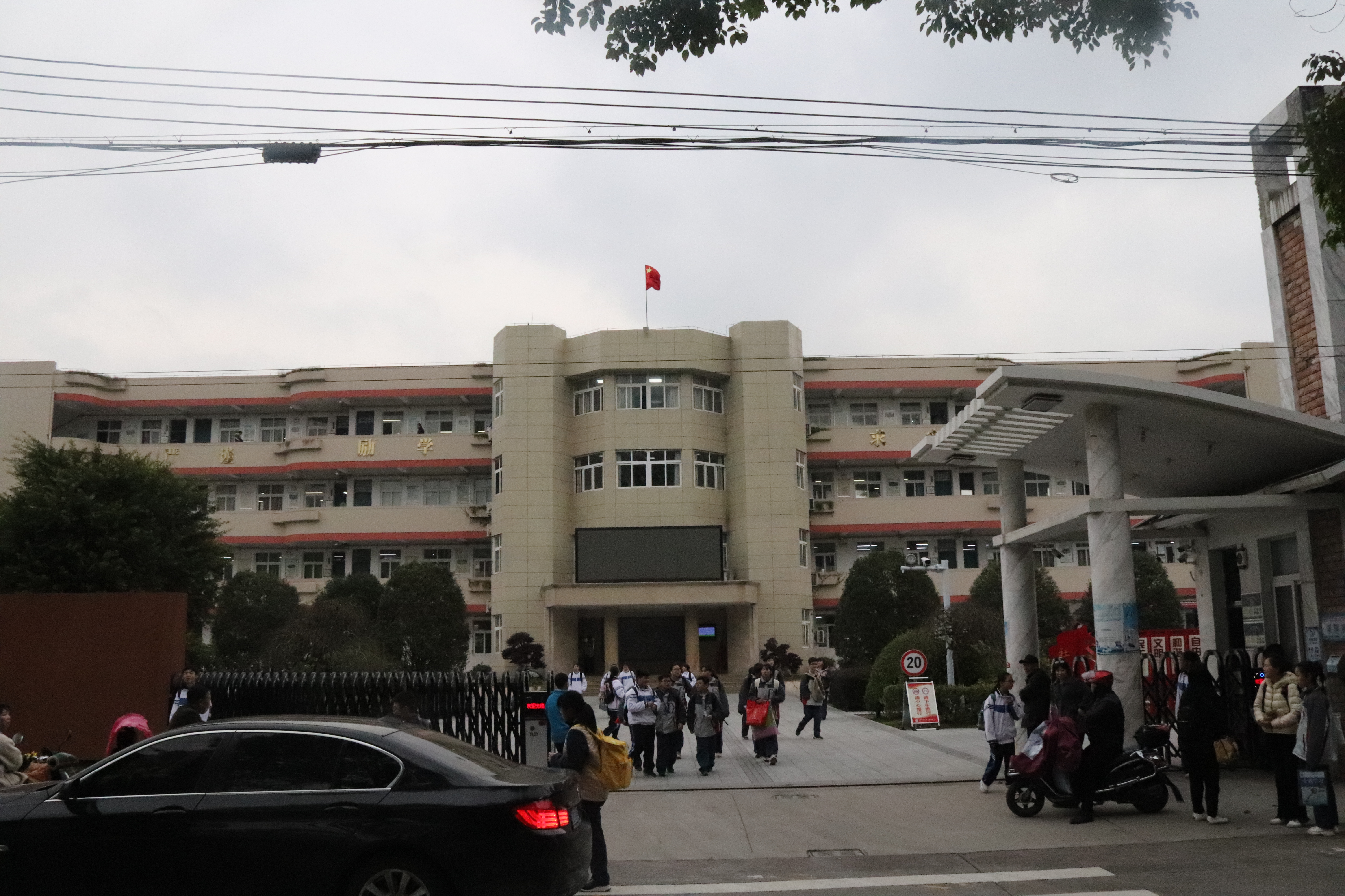 中文（中国大陆）: 玉环市城关一中一角